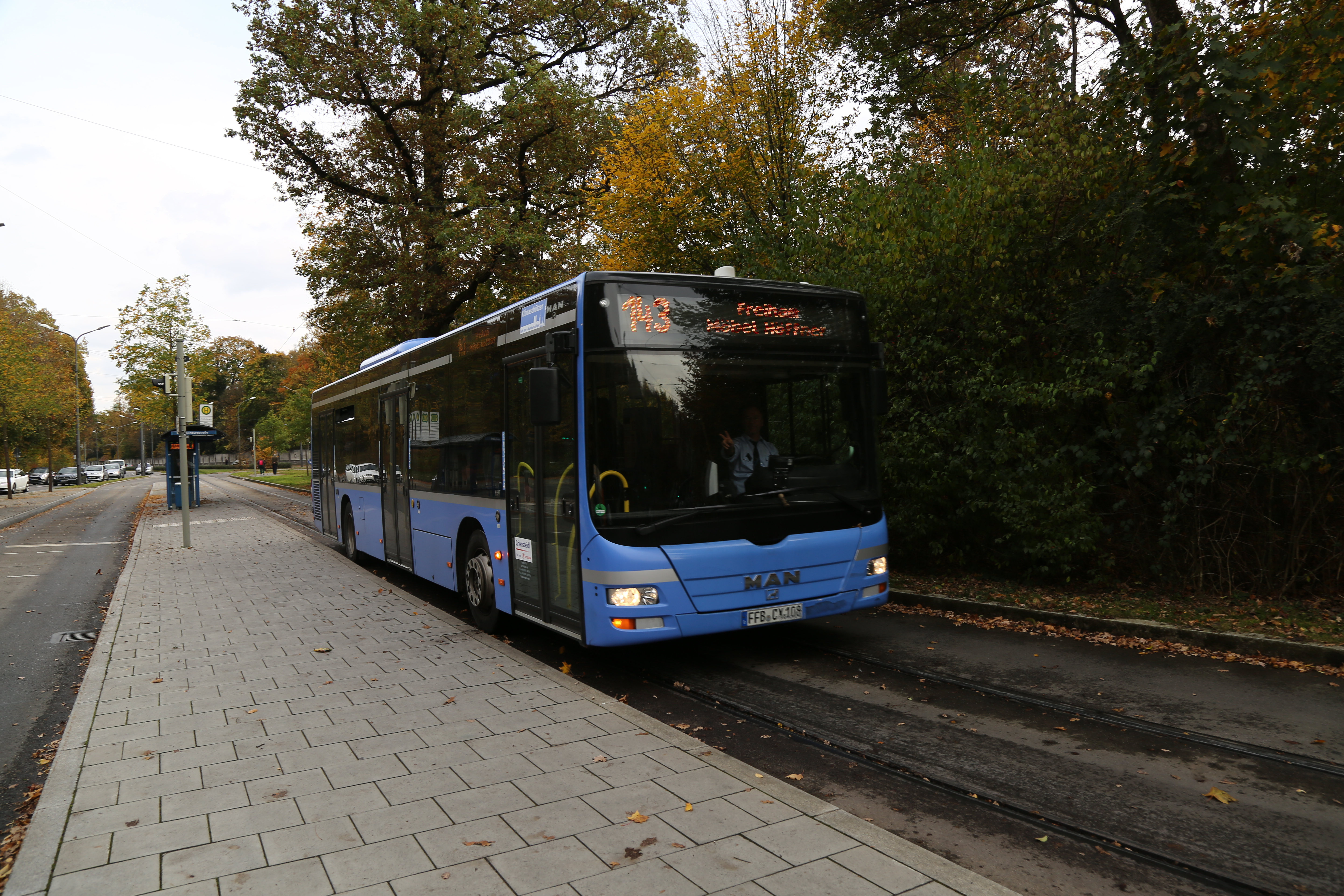 Buslinie 143 an der Haltestelle Amalienburgstraße nach Freiham, Möbel Höffner